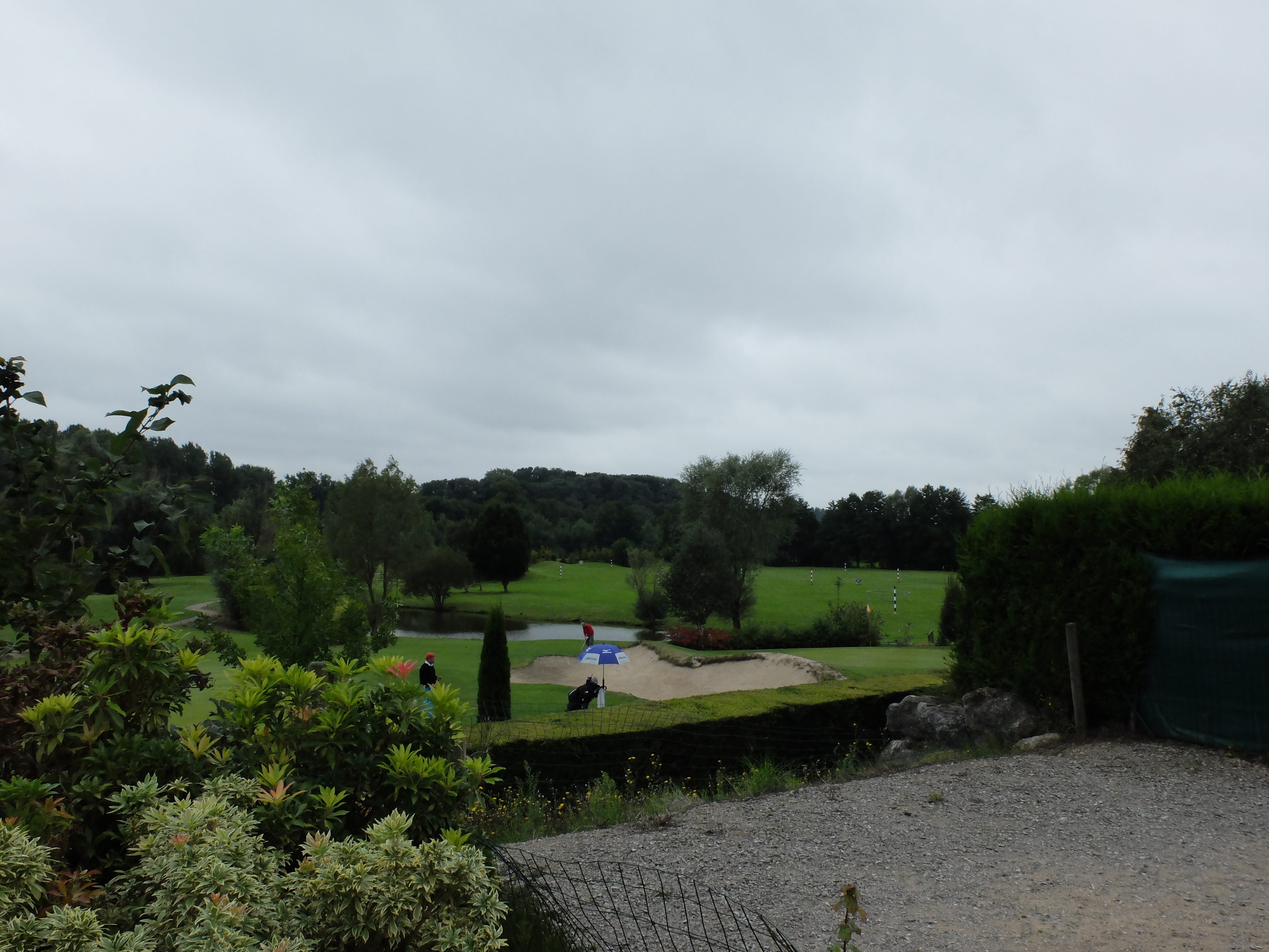 Vue du golf d'Arras à Anzin-Saint-Aubin.